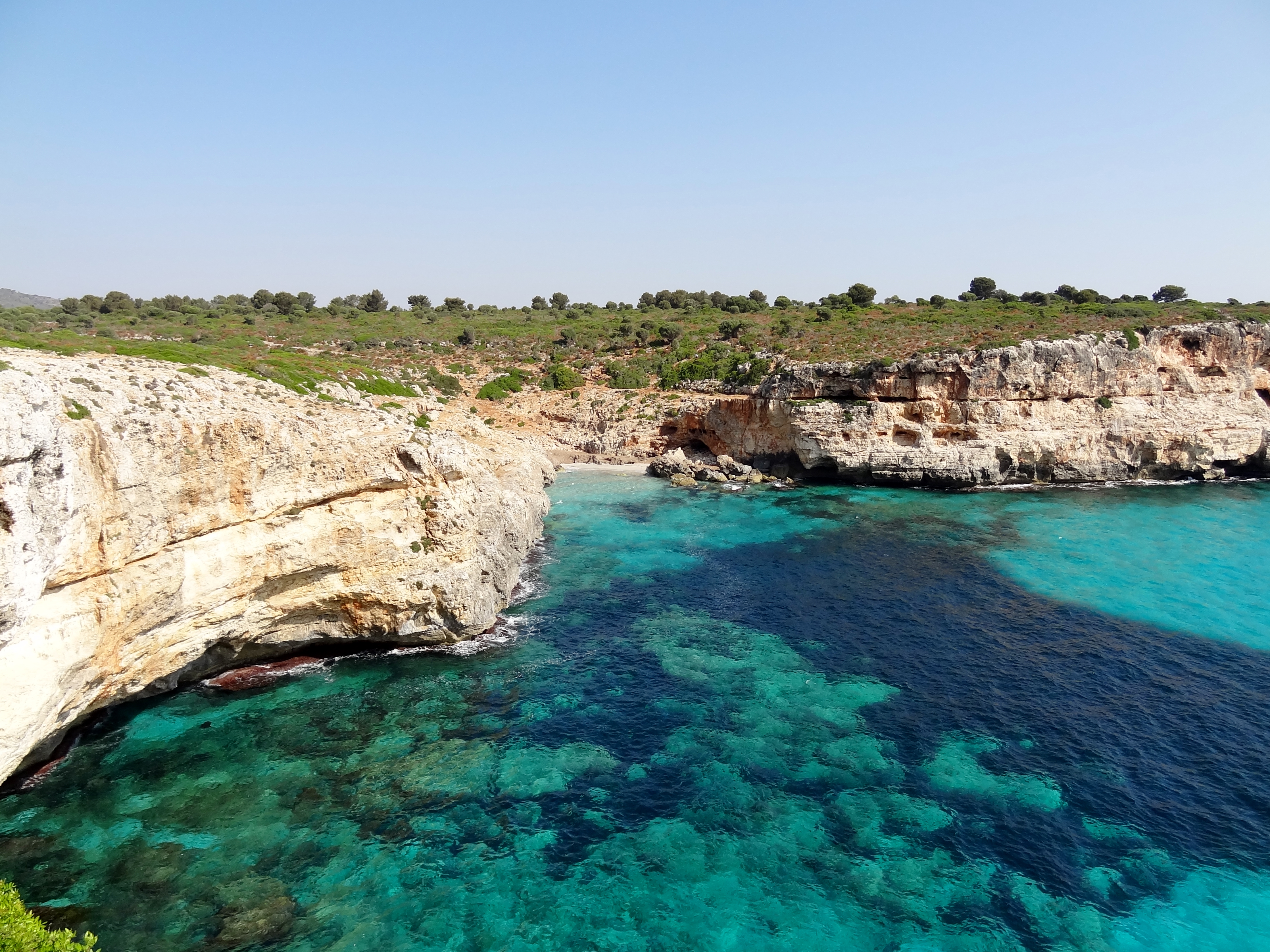 Cala Falcó, Bucht in der Gemeinde Manacor, Mallorca, Spanien